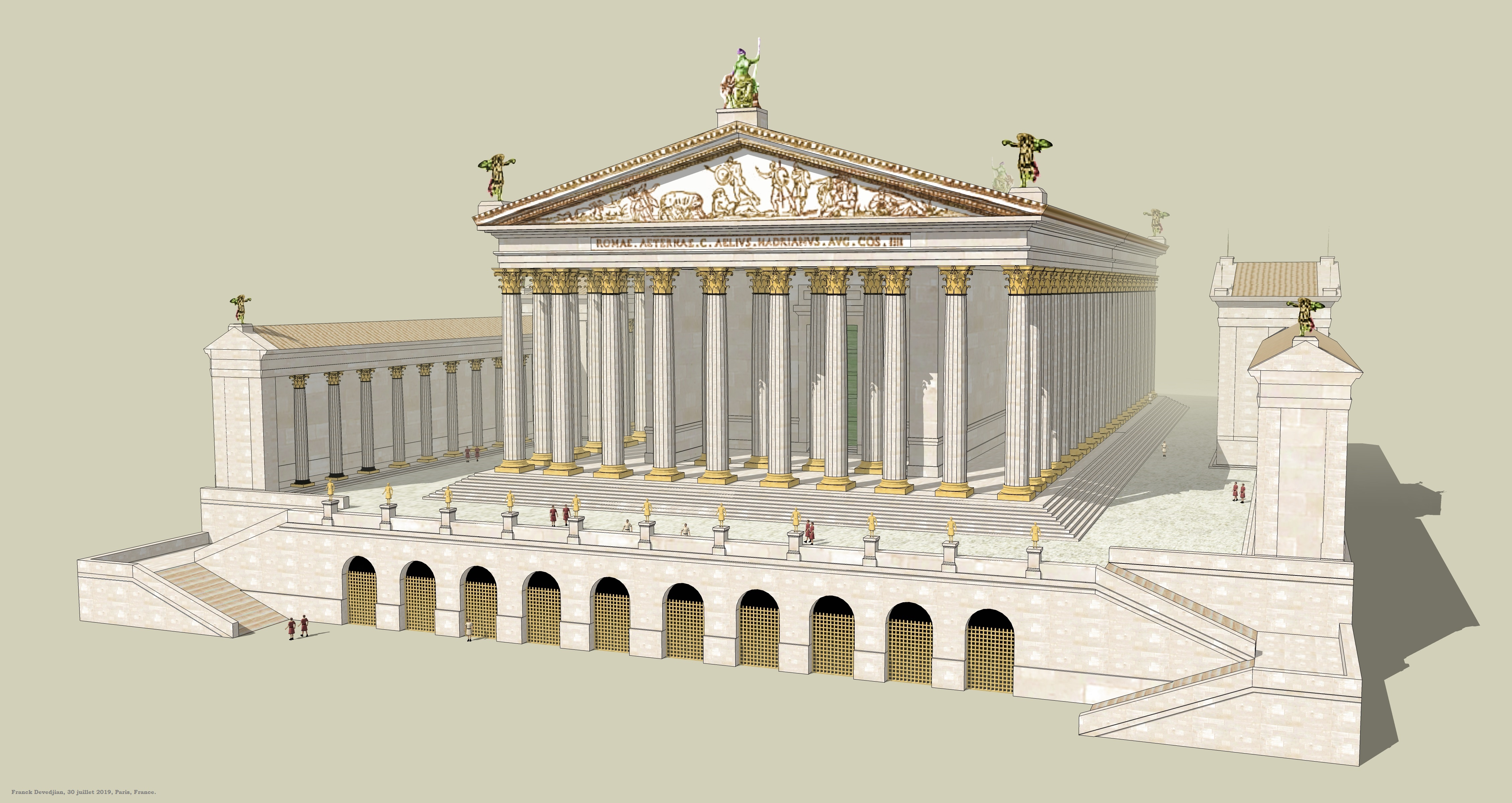 Restitution du temple de Vénus et de Rome